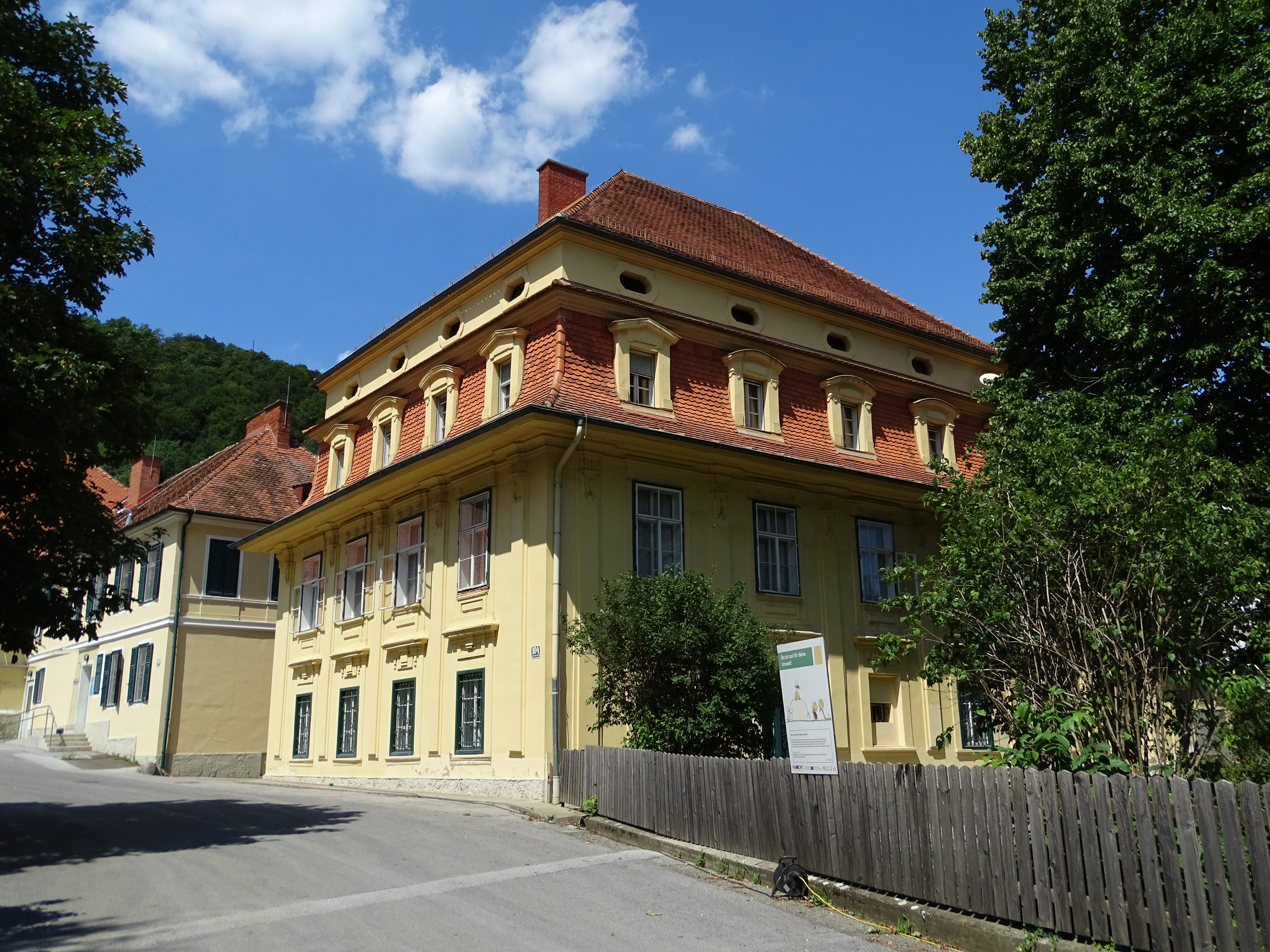 Ehem. Ansitz Krottenstein mit Wirtschaftsgebäude/Fachschule